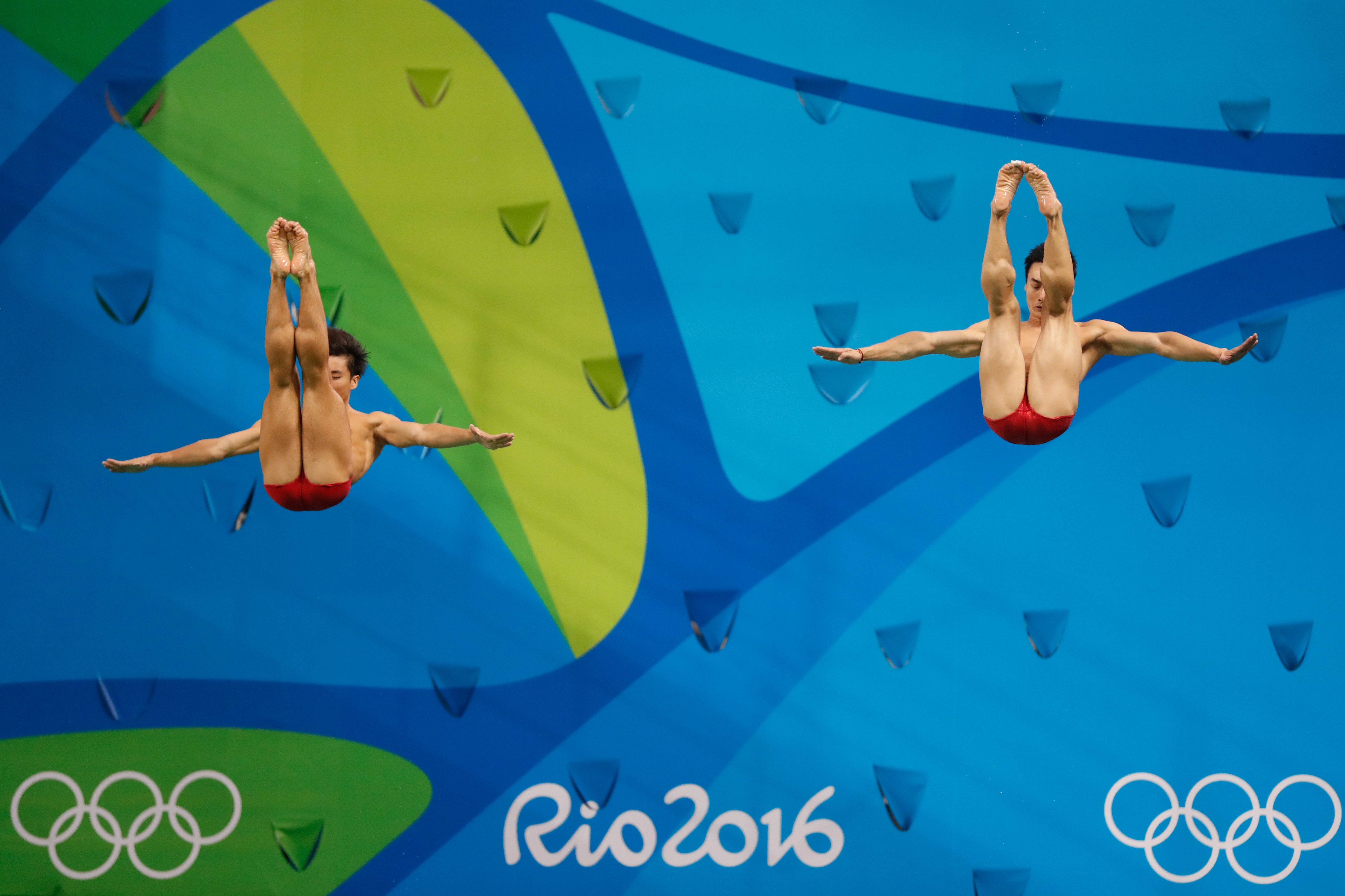 Rio de Janeiro - Chineses Yuan Cao e Kai Qin levam bronze no trampolim de 3 metros sincronizado dos saltos ornamentais nos Jogos Olímpicos Rio 2016, no Parque Aquático Maria Lenk (Fernando Frazão/Agência Brasil)